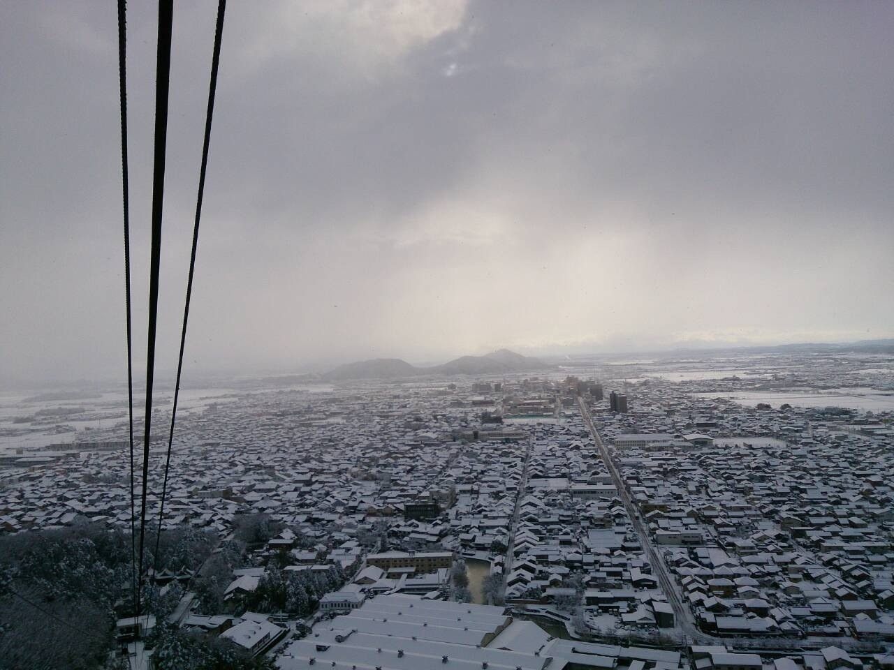 冬の八幡山